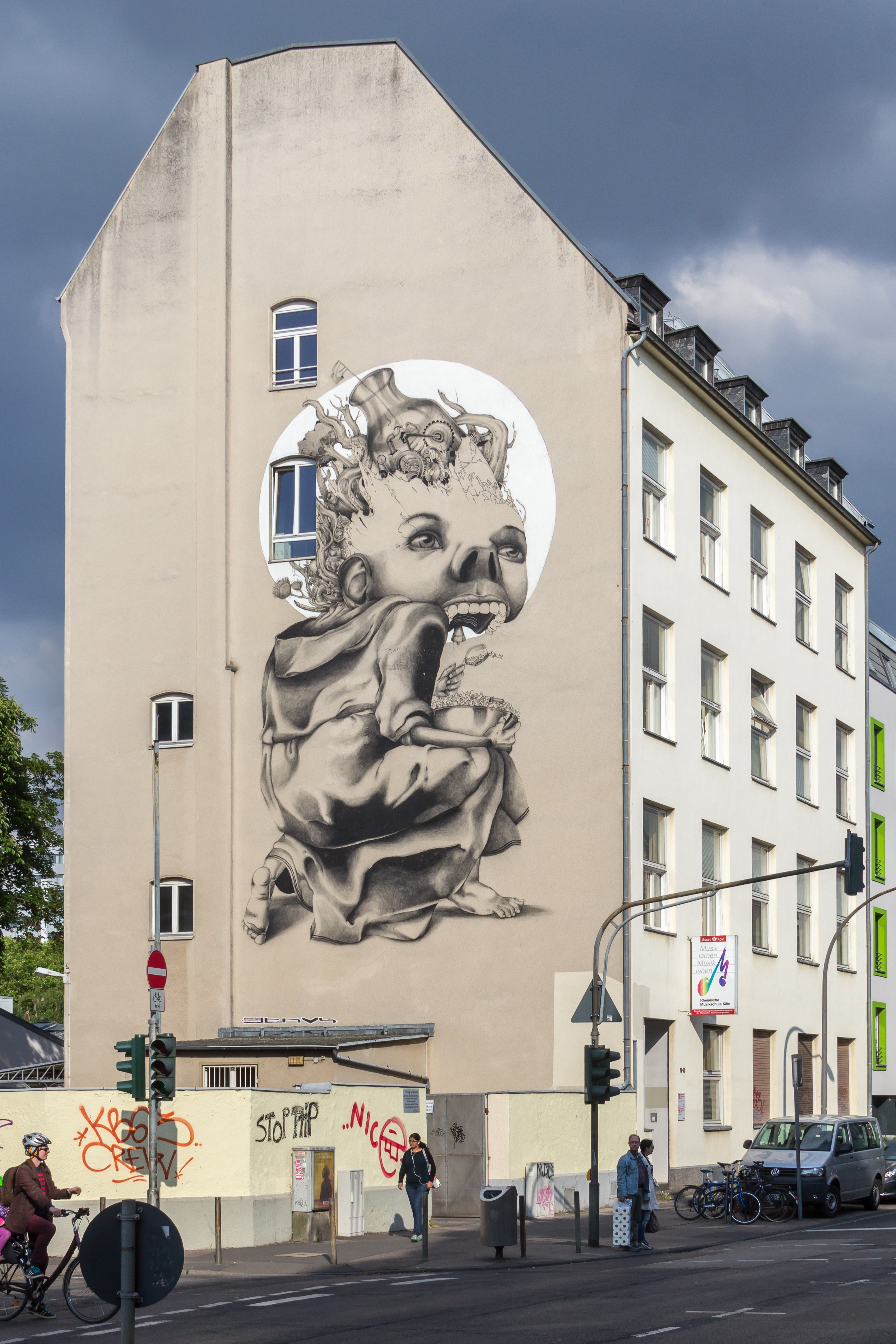 Rheinische Musikschule Köln mit Wandmalerei von Claudio Ethos